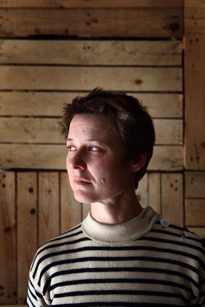 Judith Irene Vanistendael (Leuven, 1974) Belgische striptekenares en illustratrice.